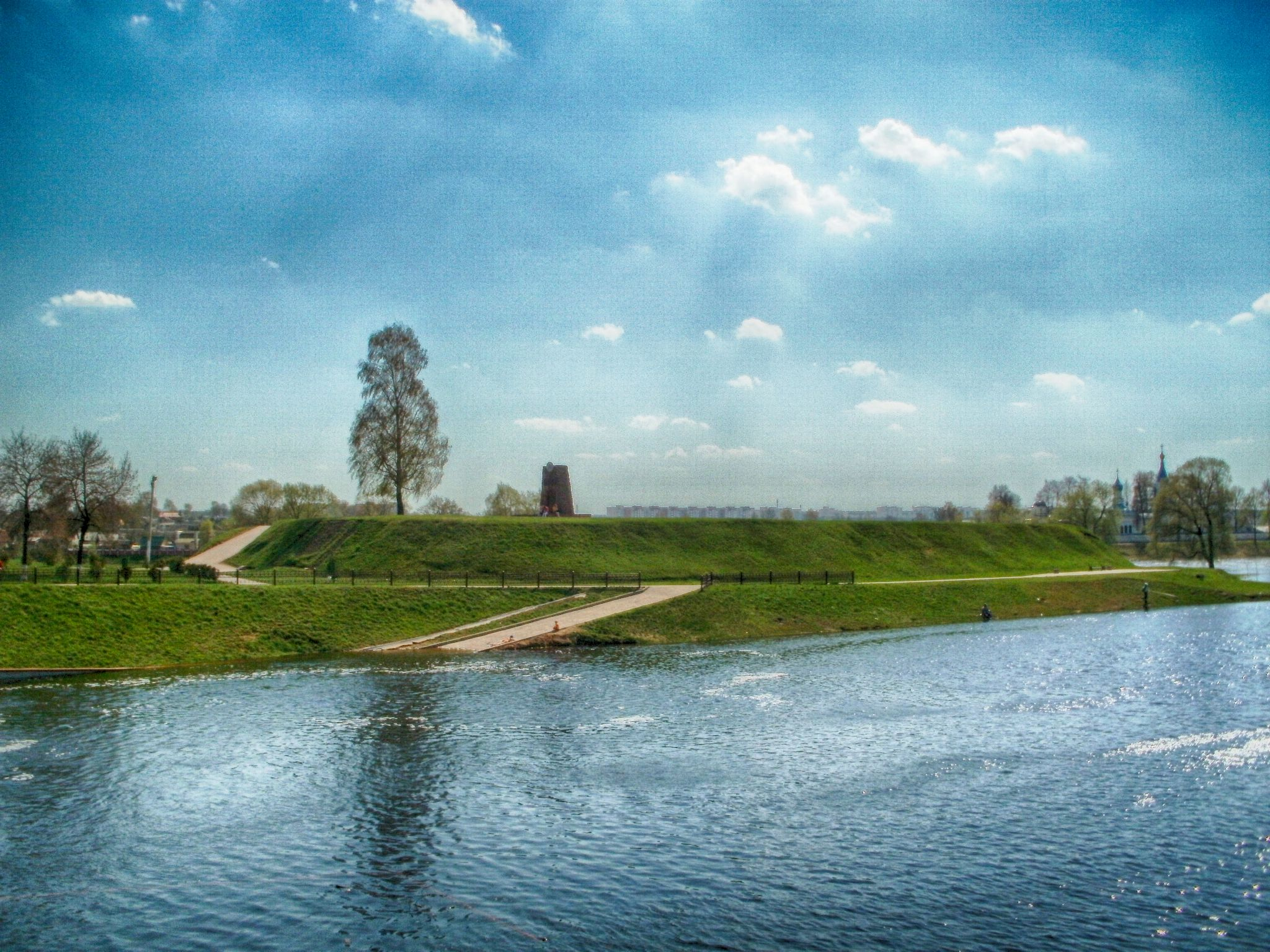 Беларуская (тарашкевіца): Ворша, гарадзішча